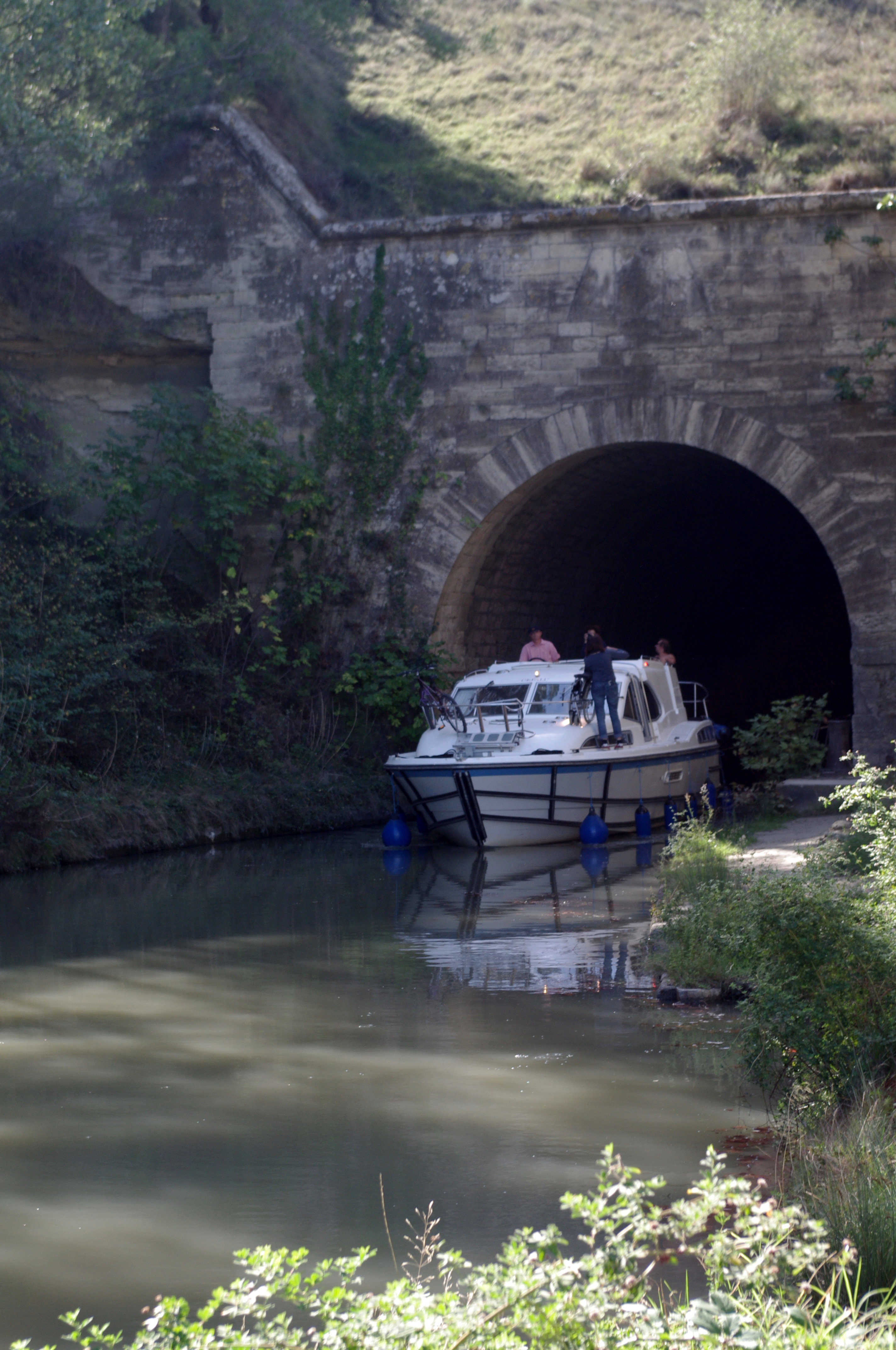 Le Canal du Midi et le tunnel de Malpas à Colombiers, Hérault, France